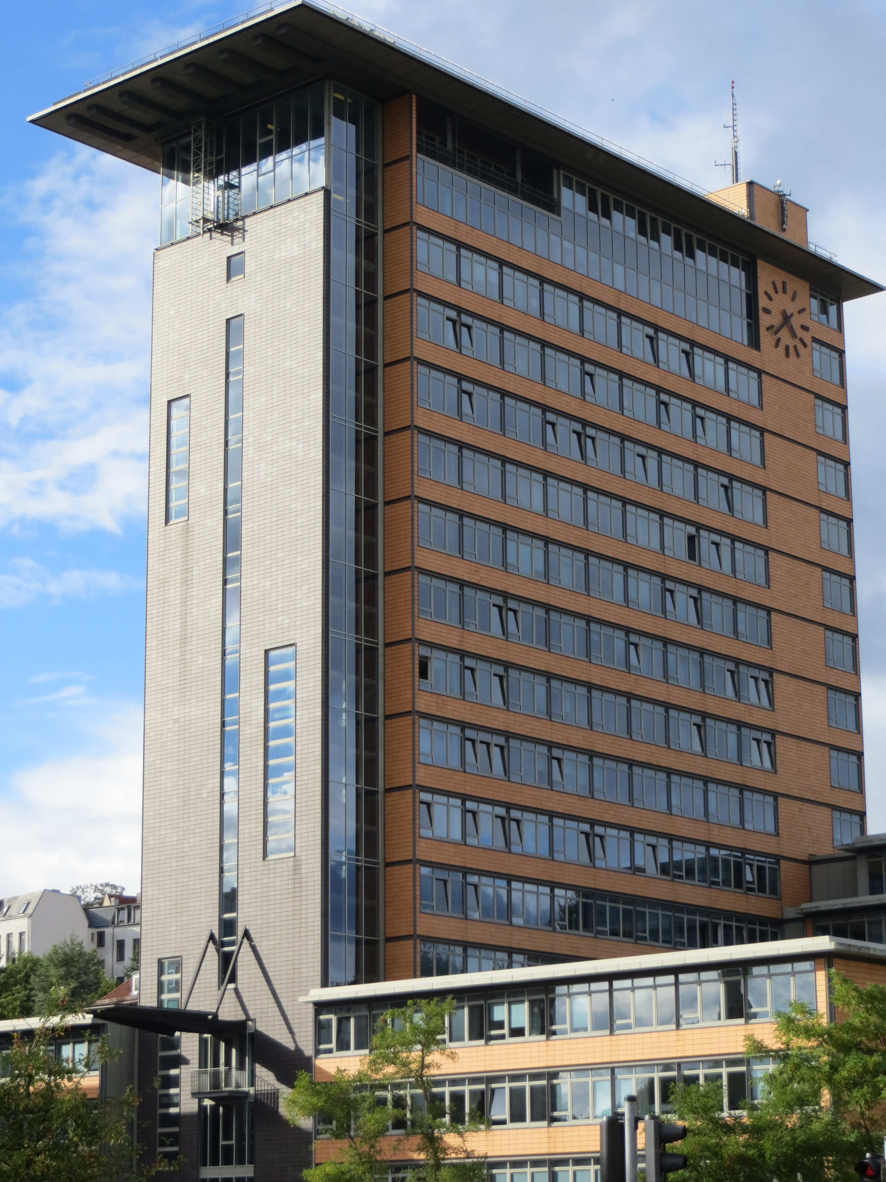 Rathaus im Sommer, Flensburg 2013, Bild 6